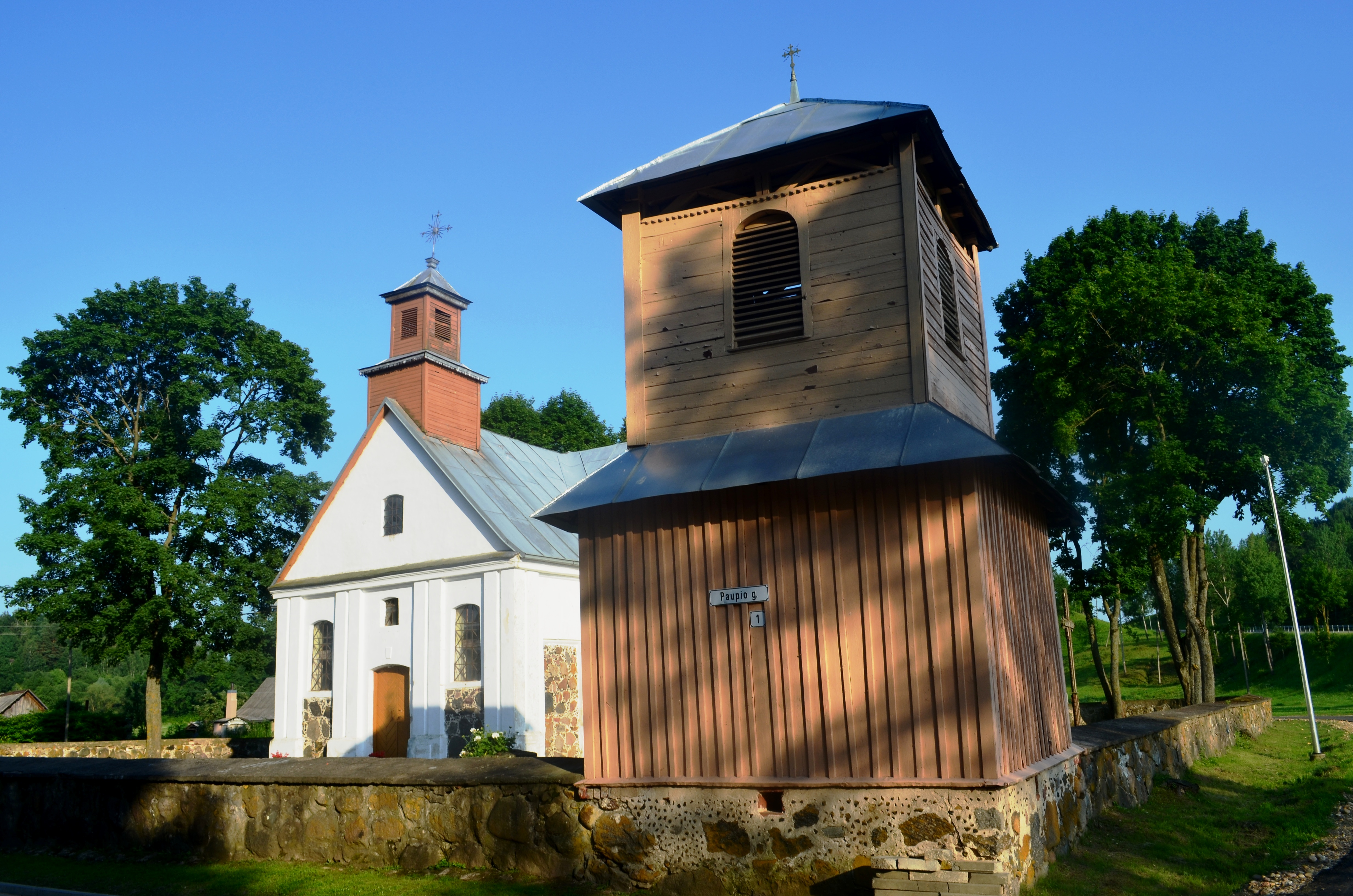 Upninkų bažnyčia, Jonavos raj.